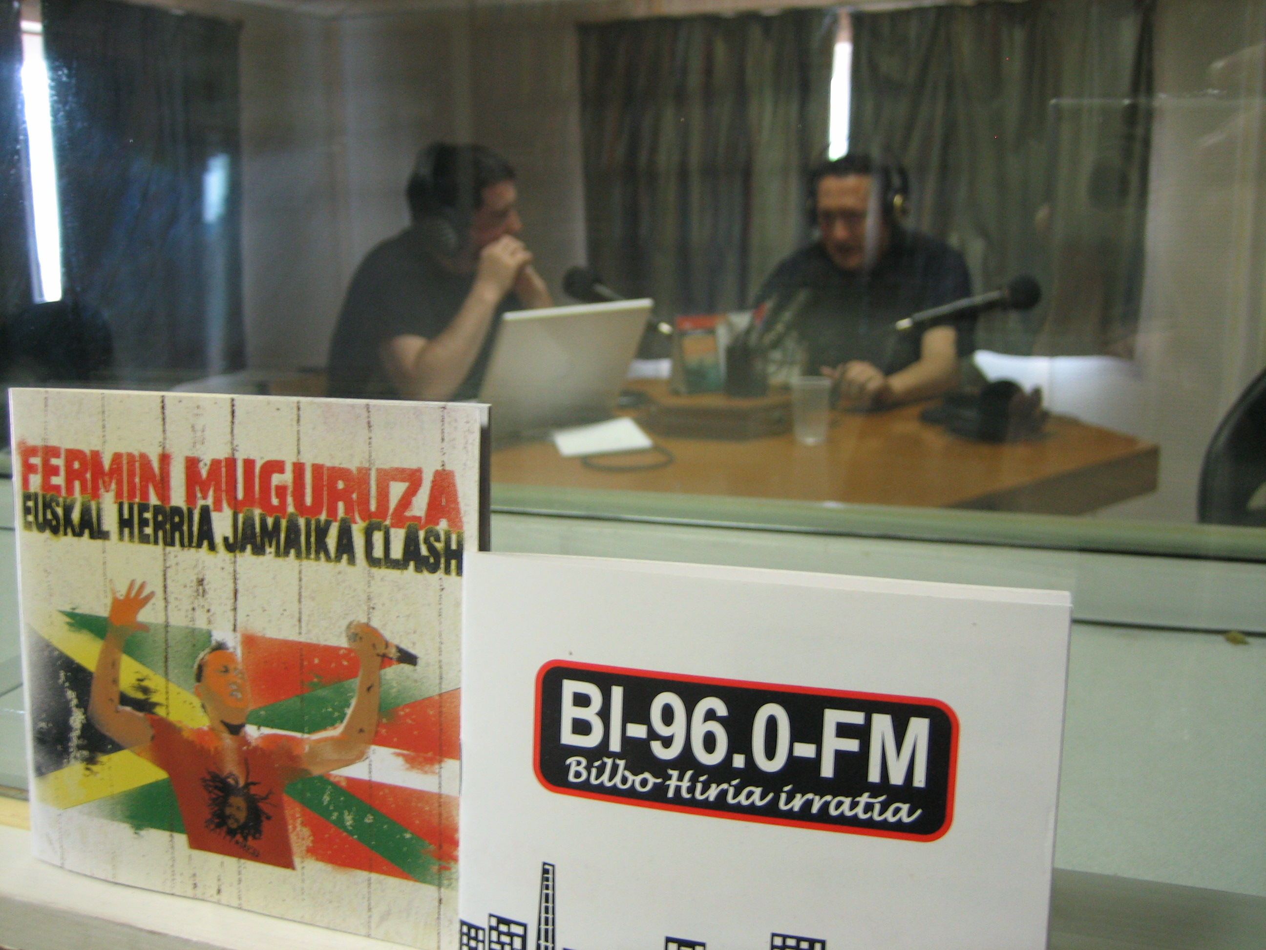 Patxi Gaztelumendi eta Fermin Muguruza katearen estudioan.